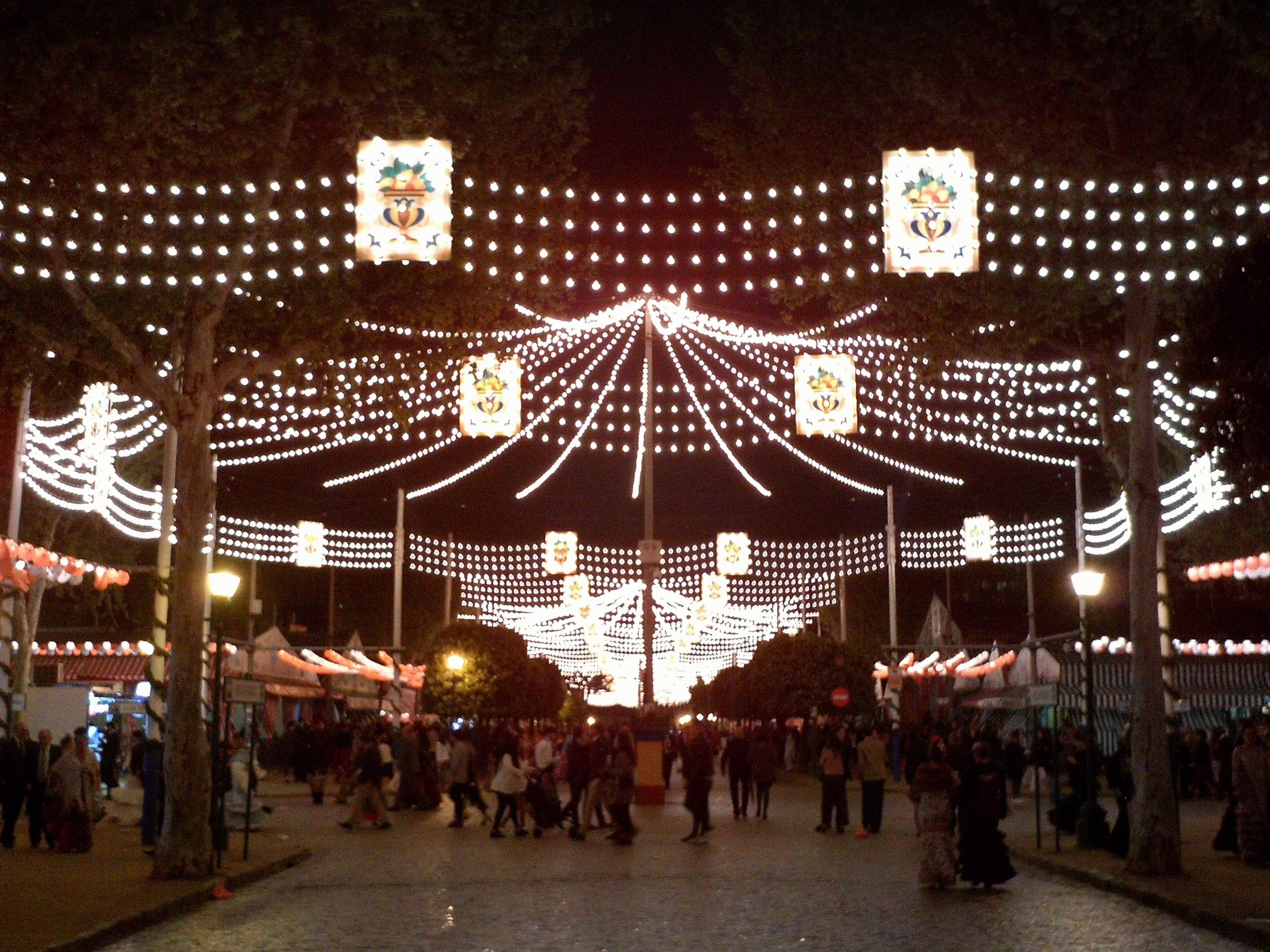 Feria de Abril. Sevilla, Andalucía, España.